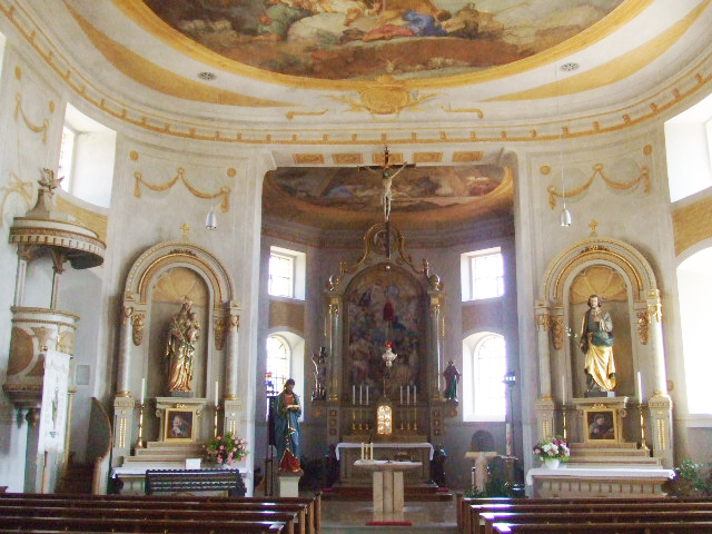 Pfarrkirche St. Jakob, Dürrenwaldstetten, Gemeinde Langenenslingen (Kreis Biberach)